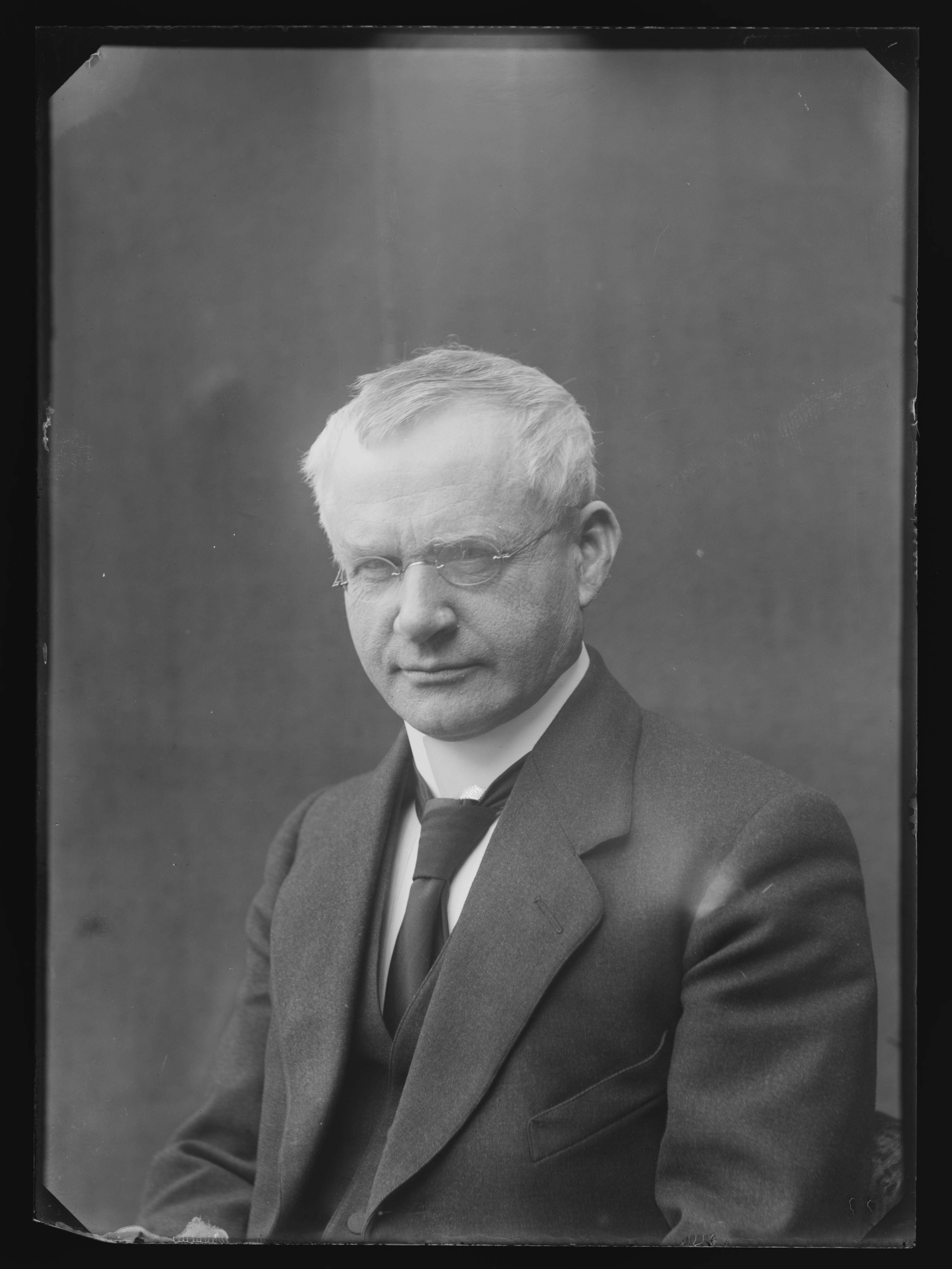 Bildet er hentet fra Nasjonalbibliotekets bildesamling. Anmerkninger til bildet var: Påskrift arkivark: Hr. postm Schøning Arkivnummer: 184